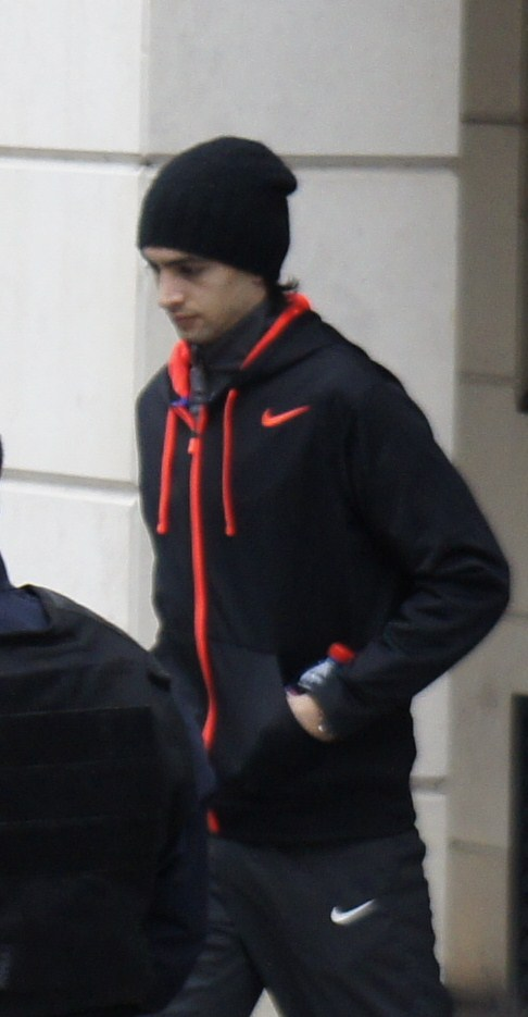 Les joueurs du PSG en déplacment à Reims sortent de leur hôtel .